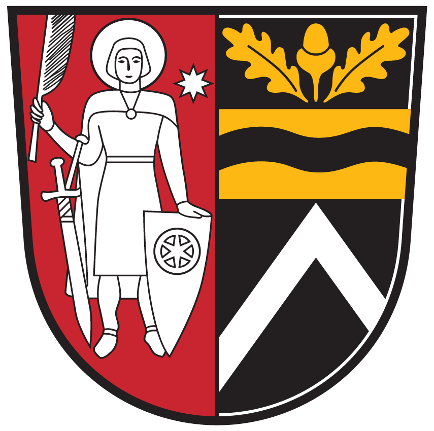 Wappen von St. Georgen am Längsee